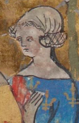 Béatrice de Bourbon, épouse de Robert de Clermont